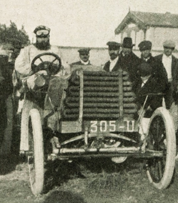 Premier vainqueur au Mont Ventoux Paul Chauchard, sur Panhard 70 hp en 1902 - La Vie au Grand Air du 27 septembre 1902, p.655